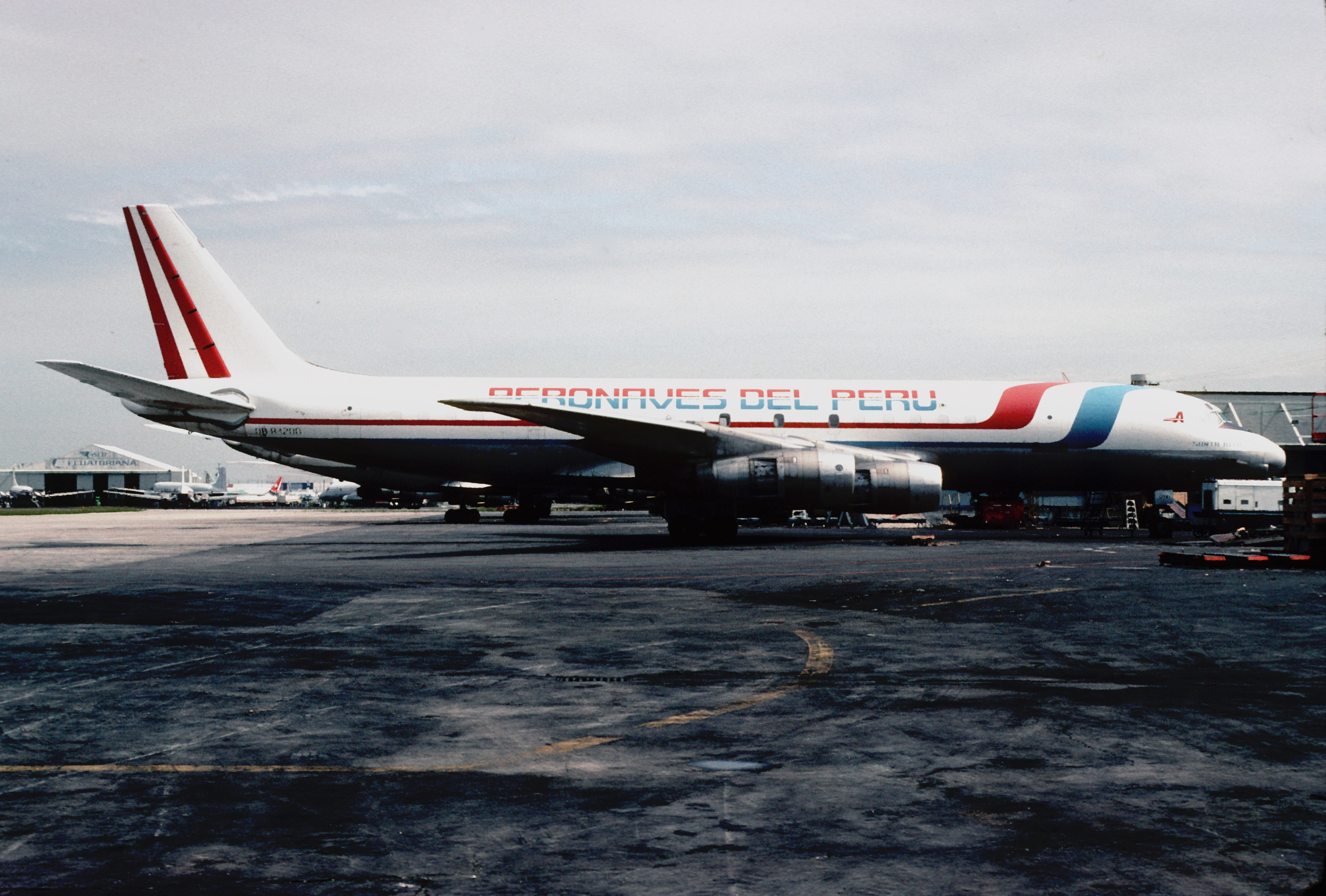 Aeronaves del Peru DC-8F-55; OB-R-1200, November 1982/ ADR